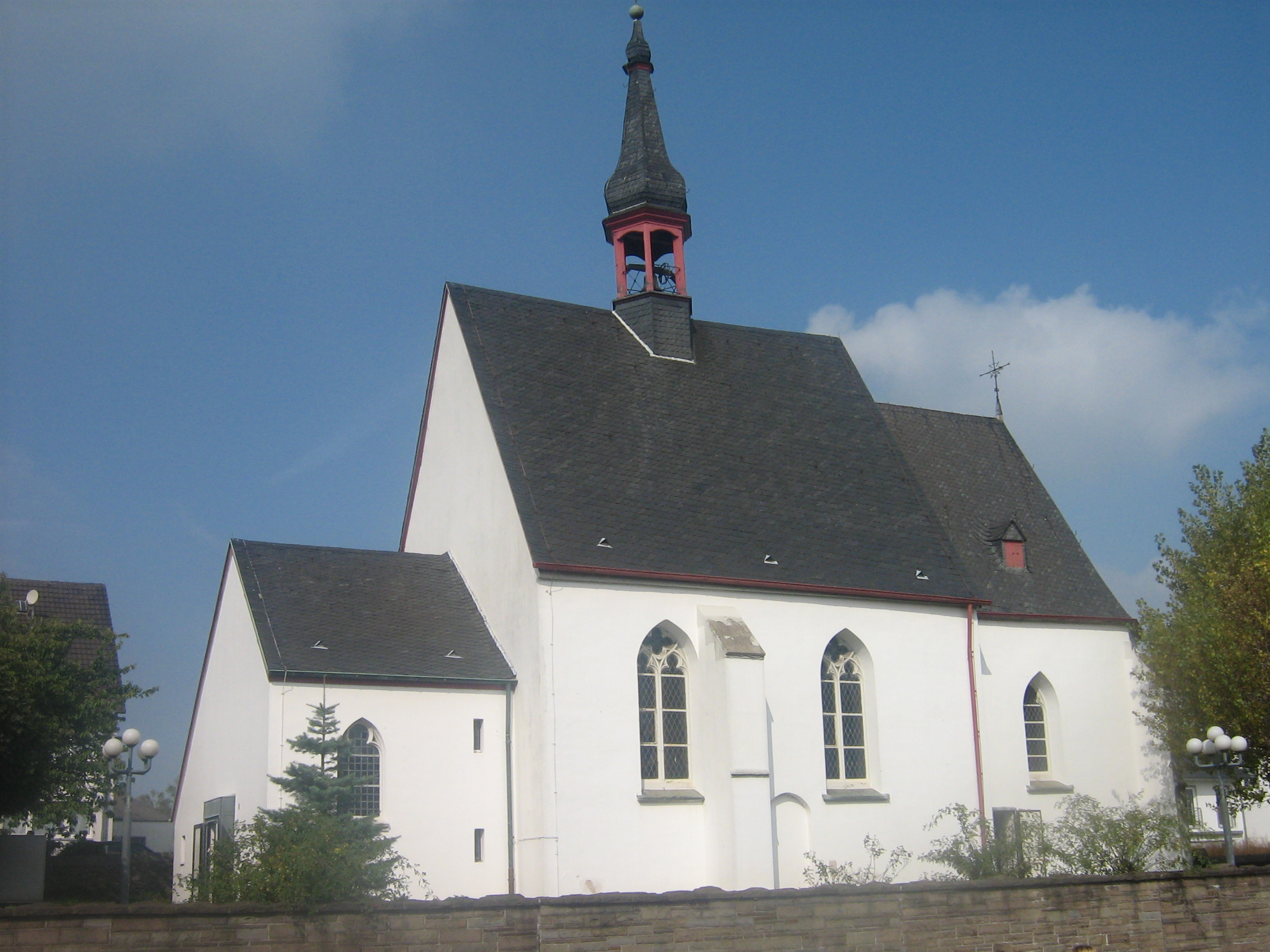 Evangelische Kirche in Tönisheide, Velbert, Ostansicht. Der rechte Teil des Gebäudes, der Kapellenchor, wurde gegen 1700 erbaut. Links der Vorbau mit Eingang und Sakristei wurde erst während der Restaurierung 1971-1974 angebaut.